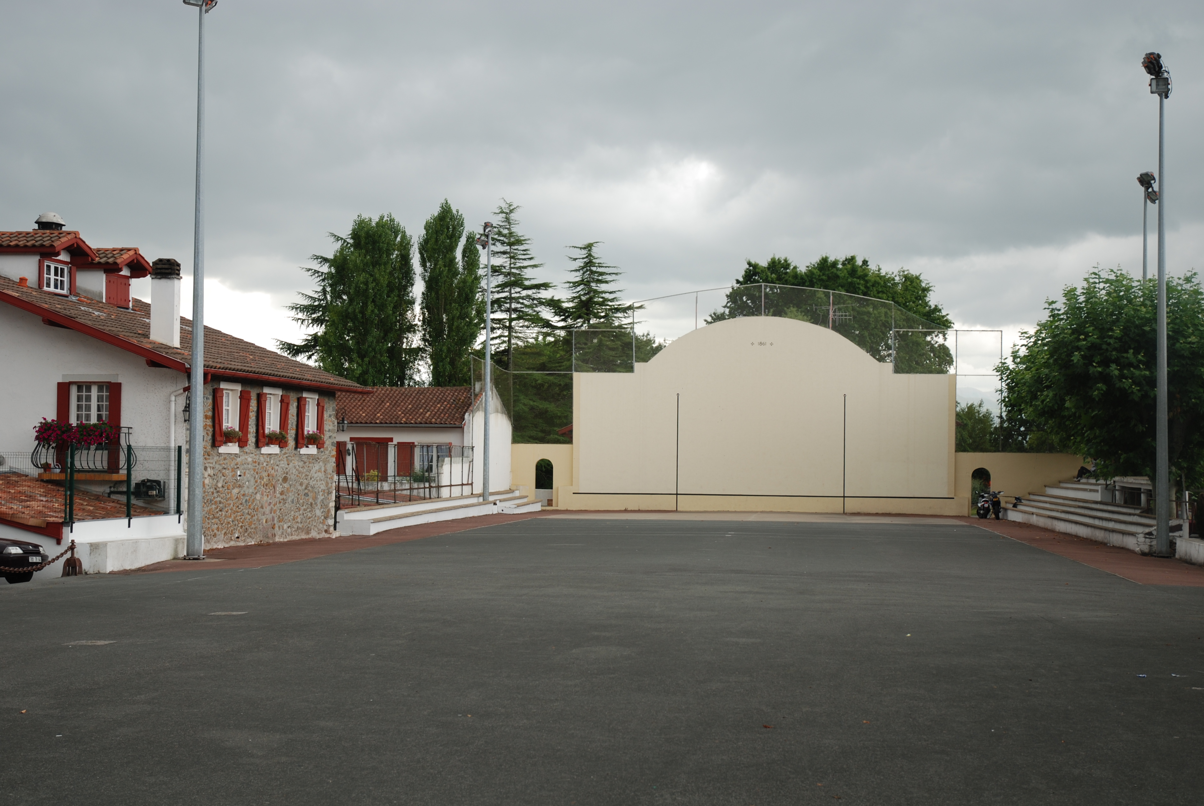 Villefranque, fronton place libre